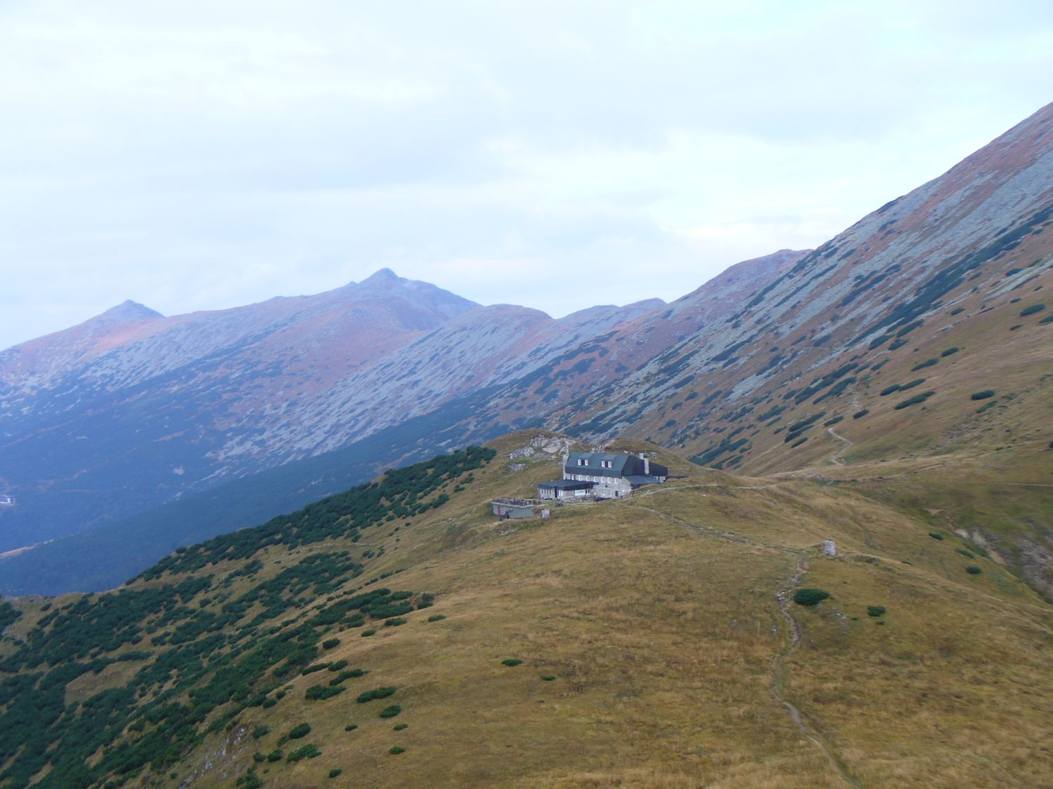 Schronisko im. gen. Stefanika